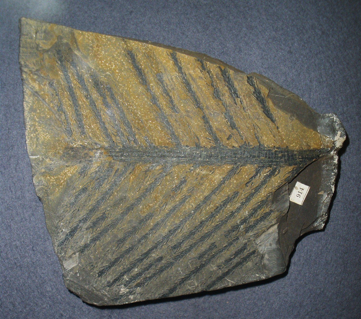 Fossil of Lebachia, an extinct plant- Took the photo at Senckenberg Museum of Frankfurt